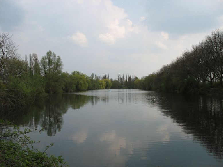 Blauer See in Duisburg Bissingheim von Süd nach Nord Sonstiges: Version 0.1